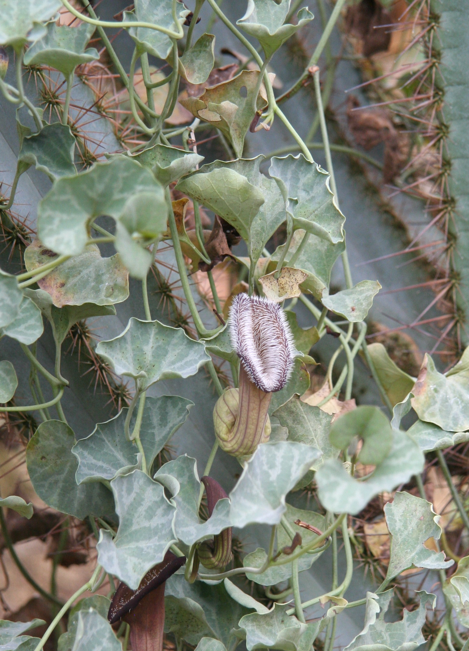 Aristolochia chilensis im Botanischen Garten Dresden